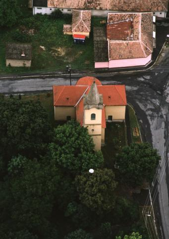 Kisgörbő, Hungary, aerialphotography. Borromei Szent Károly római katolikus templom